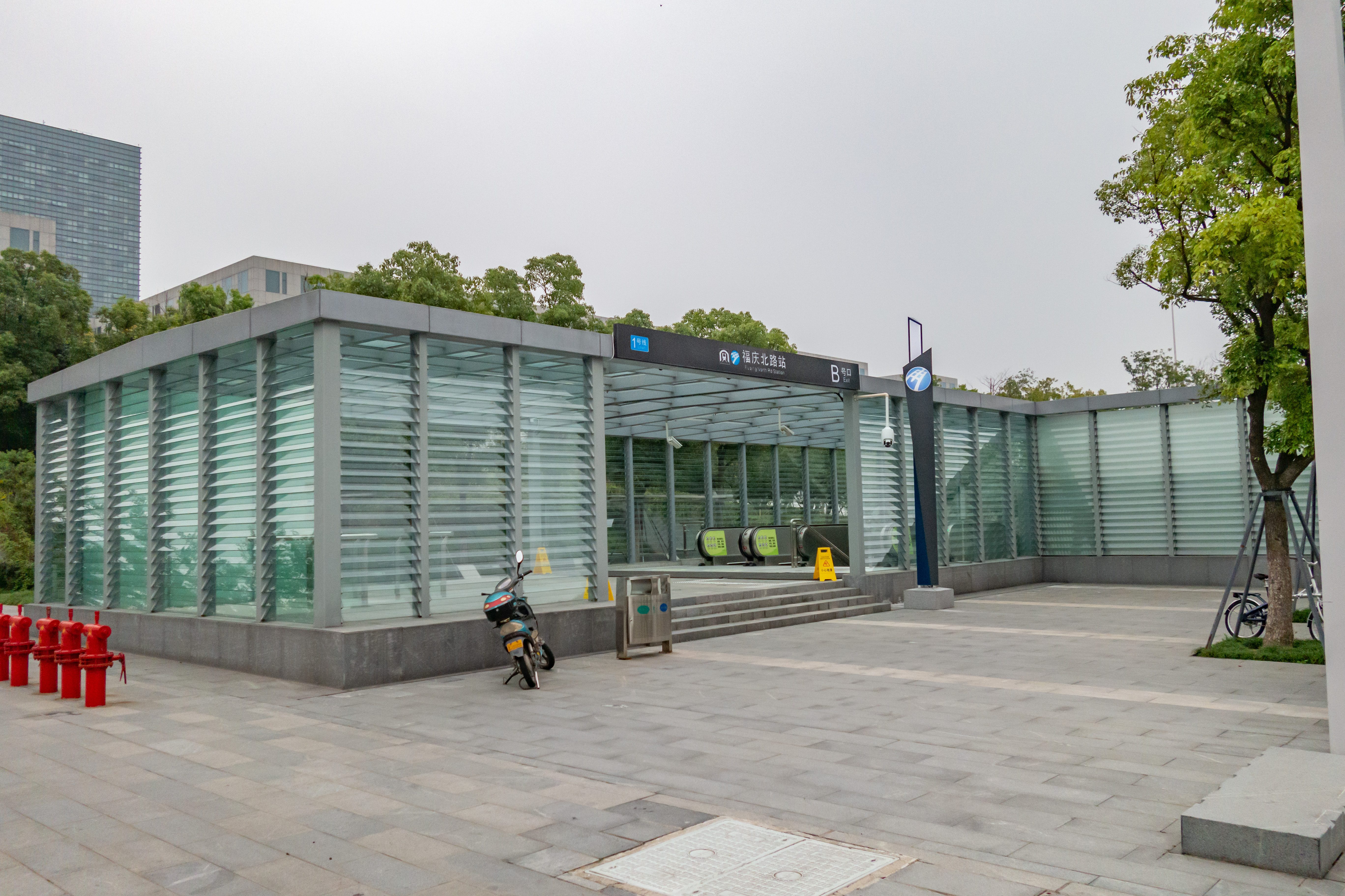 福庆北路站B出口